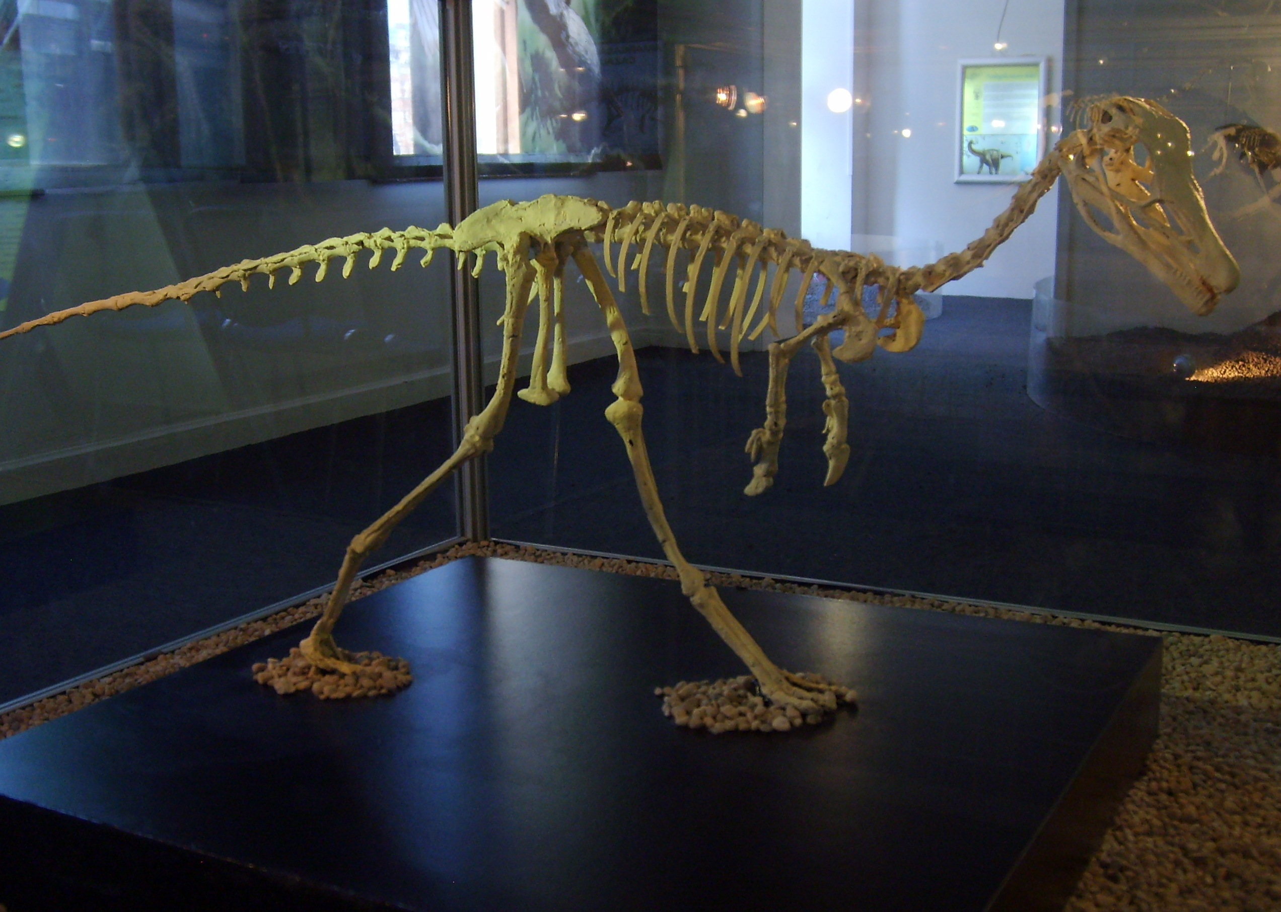 Alvarezsaurus skeleton restoration, Copenhagen.